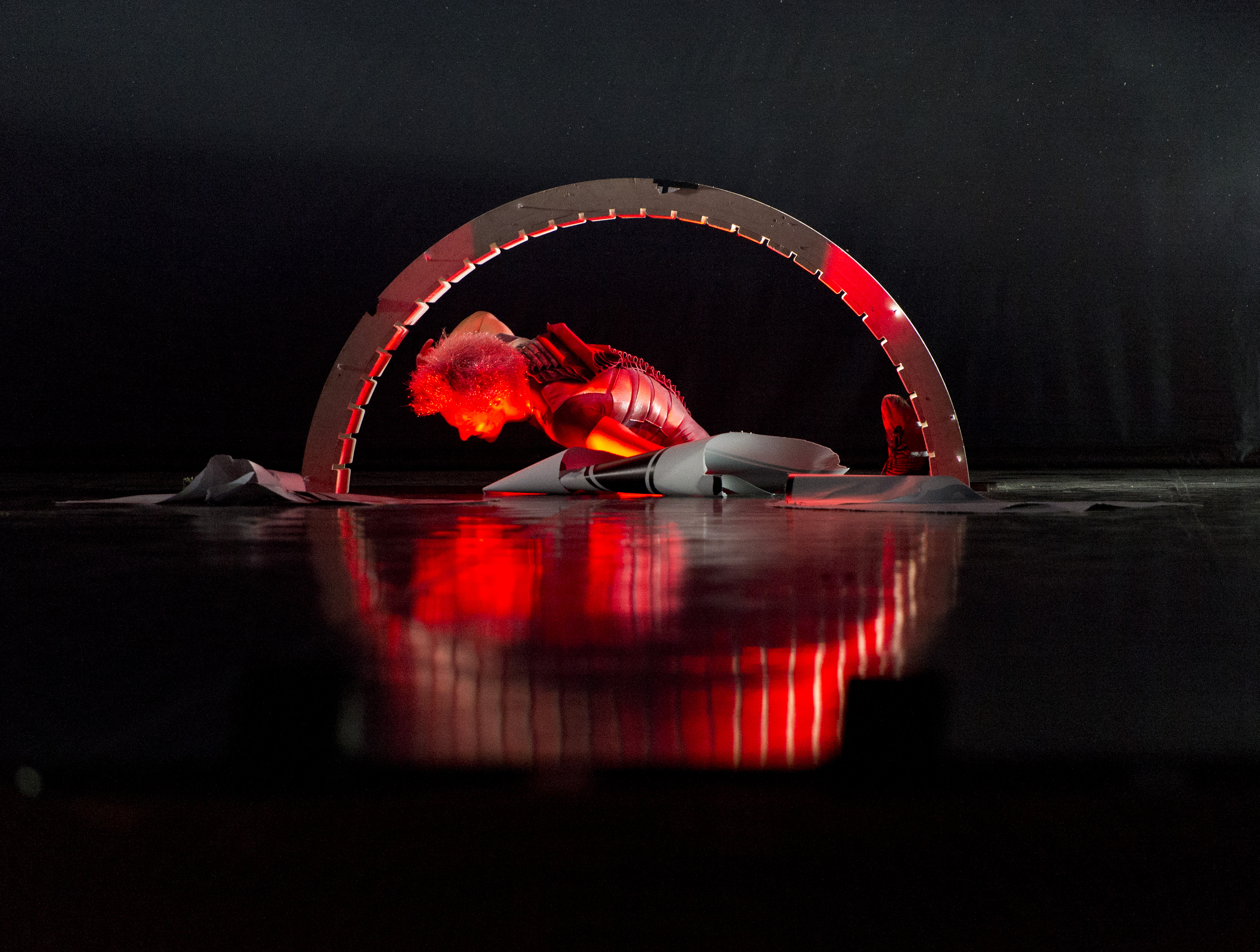 Rahvusooper Estonia 2015